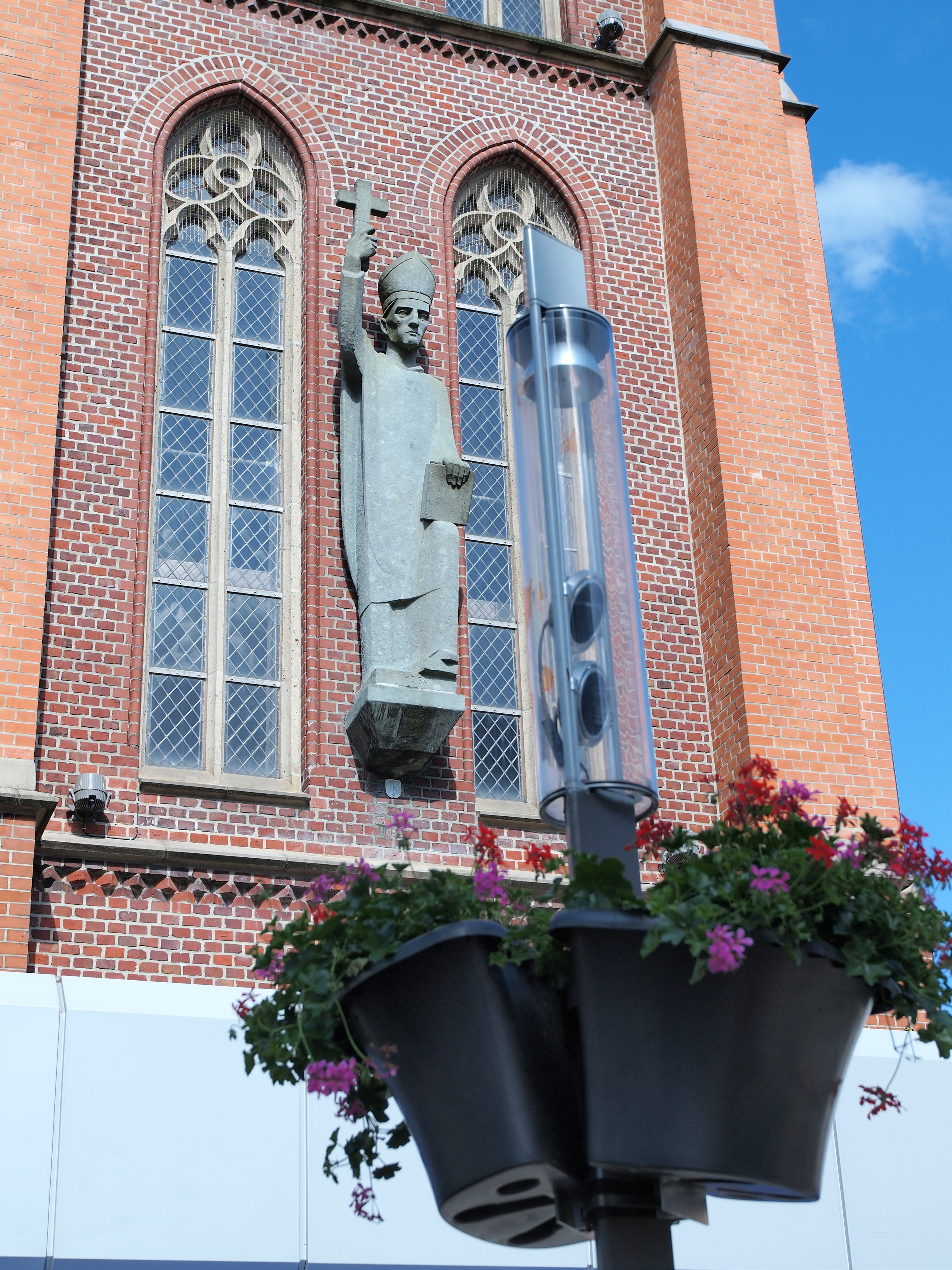 Statue des Heiligen Bonifatius an der Bonifatiuskirche in Herne, 1954 aufgestellt, Bildhauer: Hubert Hartmann, Material Anröchter Stein